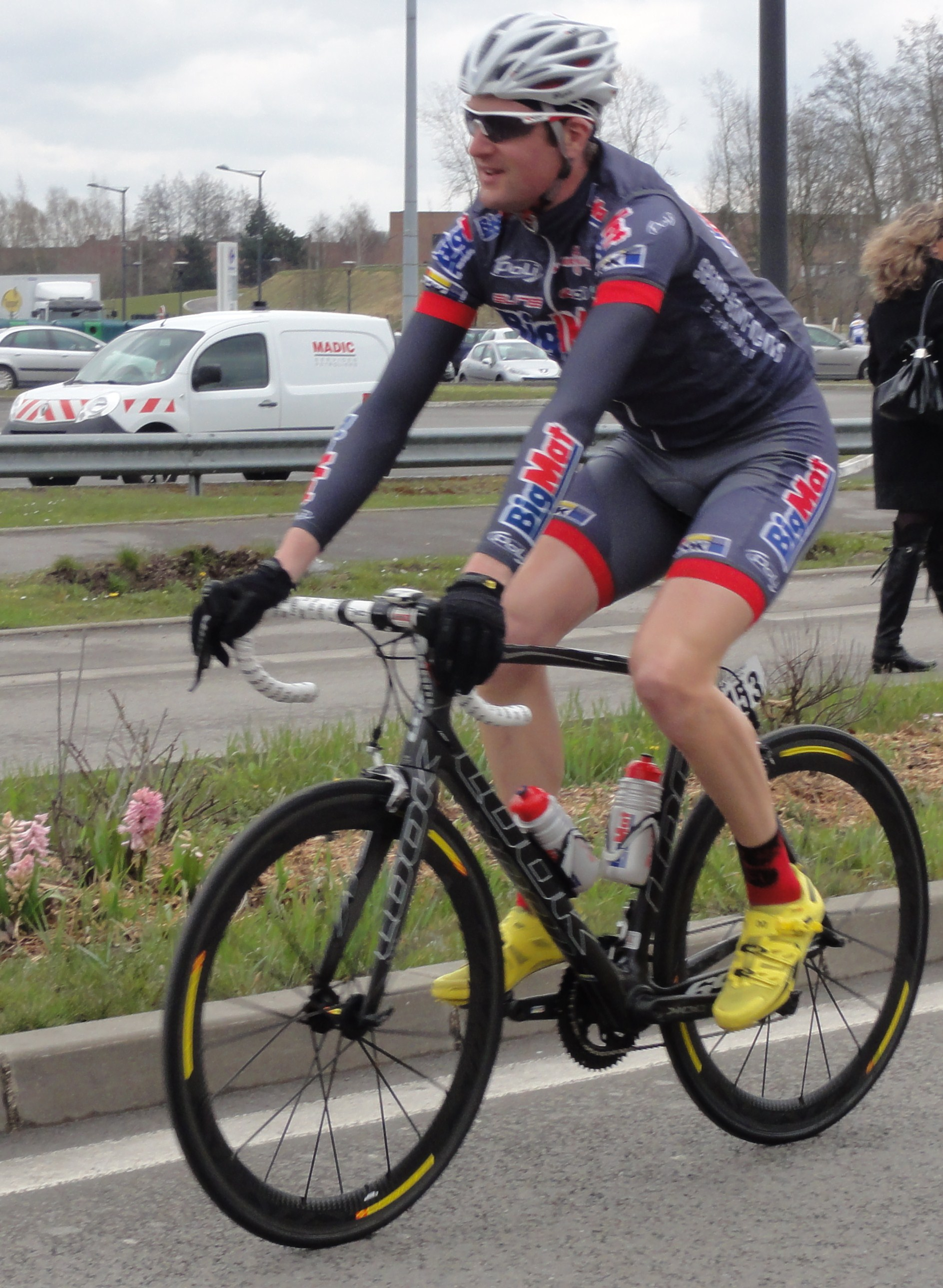 Reportage photographique réalisé le mardi 11 avril 2013 durant l'édition 2013 du Grand Prix de Denain à Denain, Nord, Nord-Pas-de-Calais, France. Depicted person: Nicolas Bazin